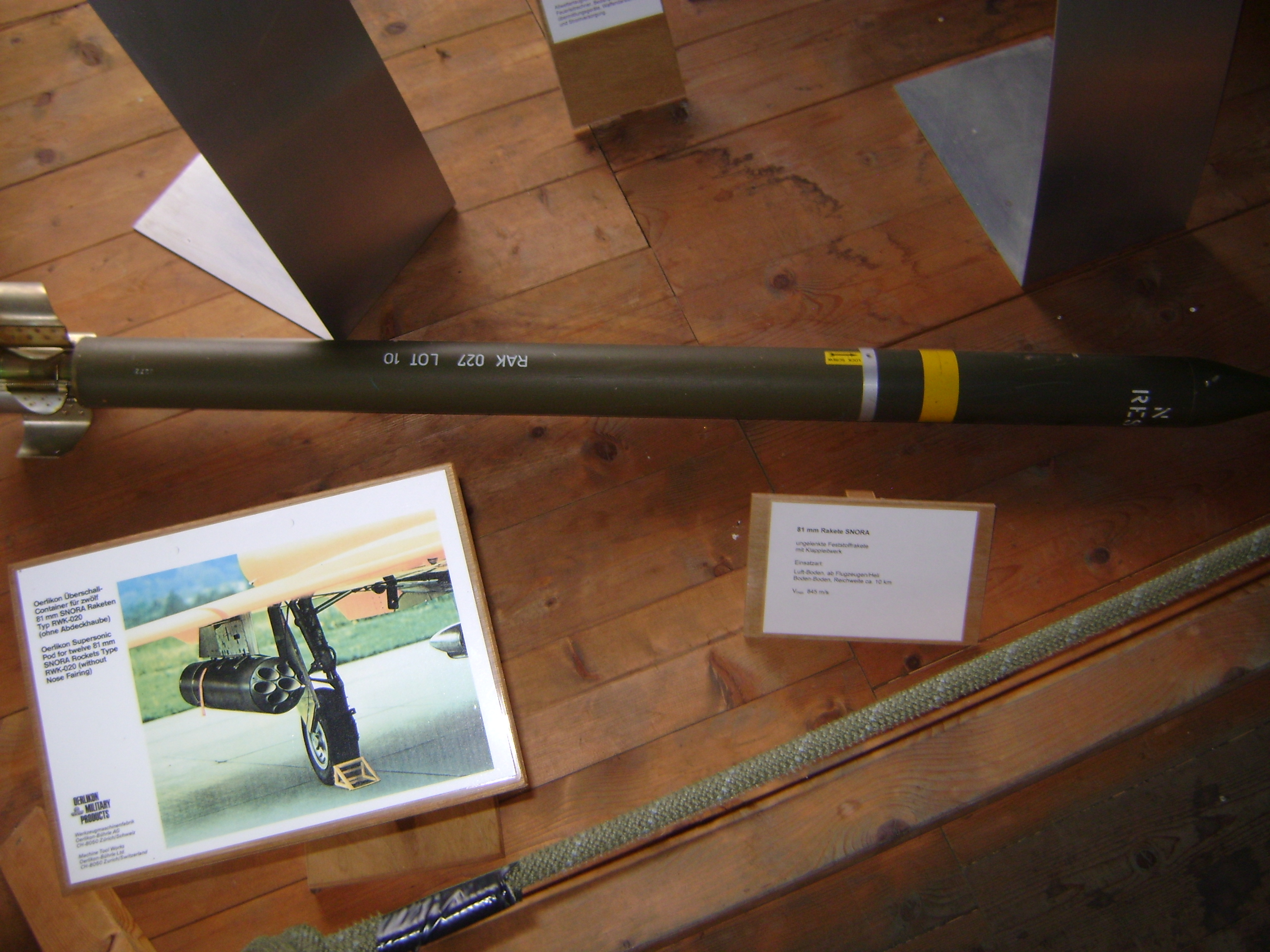 SNORA MISSILE